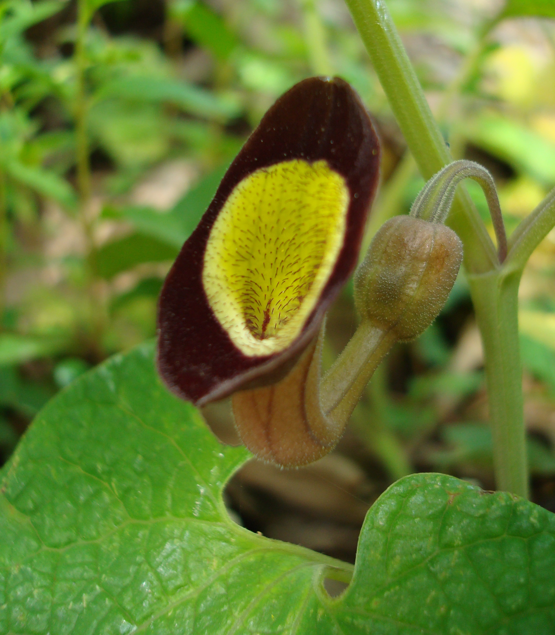 Кирказон или аристоло́хия (Aristolochia steupii) - редко встречающееся дикорастущее растение на территории Сочинского национального парка., Сочи This image is related to the protected area of Russia number 2300430